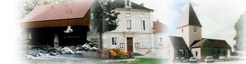 Photo montage église, lavoir, mairie de Cessey sur tille Auteur : Association CC Anim'